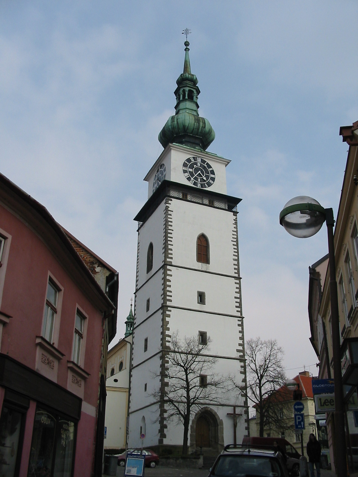 Městská věž při kostelu sv. Martina v Třebíči